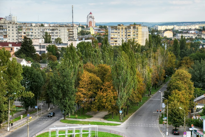 Бульвар 50-річчя Перемоги у Білій Церкві